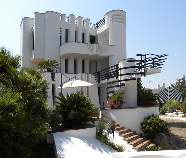 Villa D.L., isola d'Ischia. Primi anni Settanta.